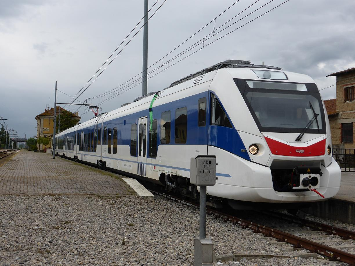 ETR 563-01 in sosta a Monte San Savino